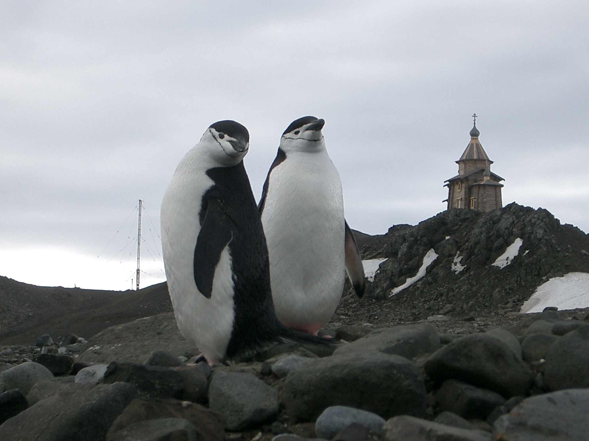 Храм Святой Троицы на российской антарктической станции Беллинсгаузен. Фото Владимира Соловьёва.